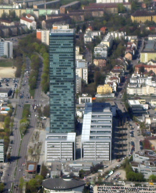 Luftbild des Uptown München Hochhauses in München